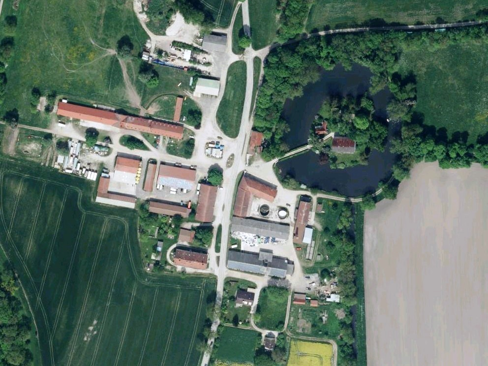 Luftaufnahme der Bayerischen Vermessungsverwaltung: Schlossgut Erching in Hallbergmoos, Landkreis Freising, Bayern.